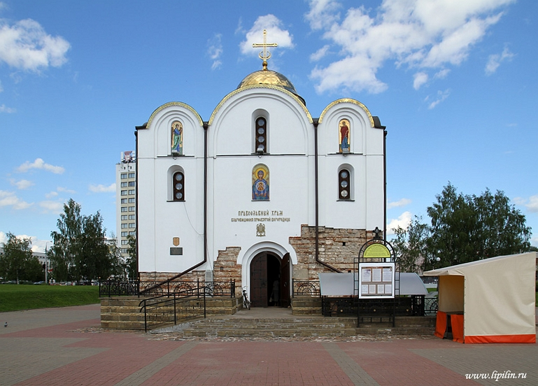 Віцебск. Дабравешчанская царква. Фасад